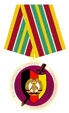 Abbildung eines Prototypes zur Verdienstmedaille des Ministeriums für Staatssicherheit (MfS)